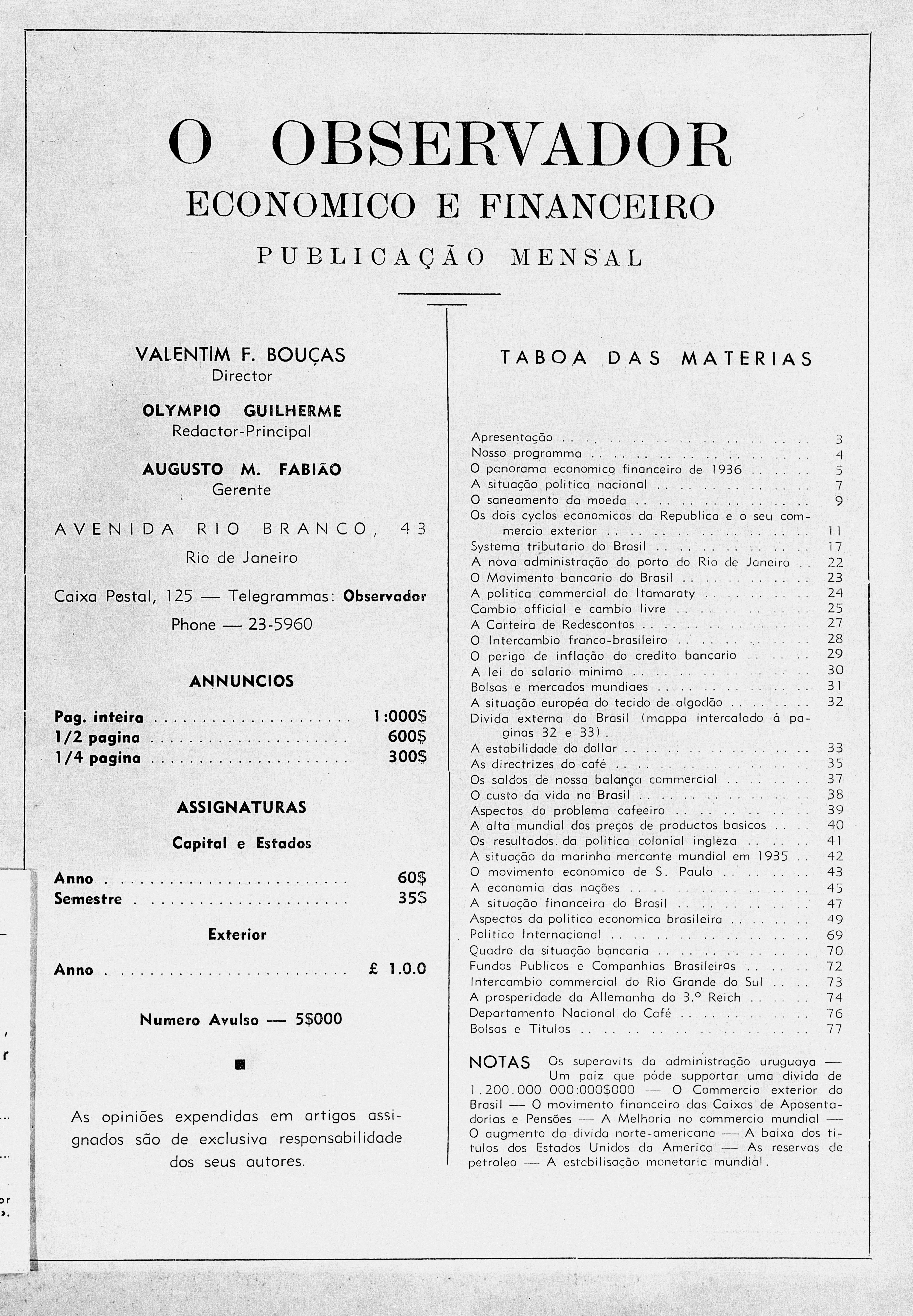 Primeira página (com os créditos) da revista extinta mensal sobre economia O Observador Econômico e Financeiro, de seu número 1. O periódico circulou até dezembro de 1962.